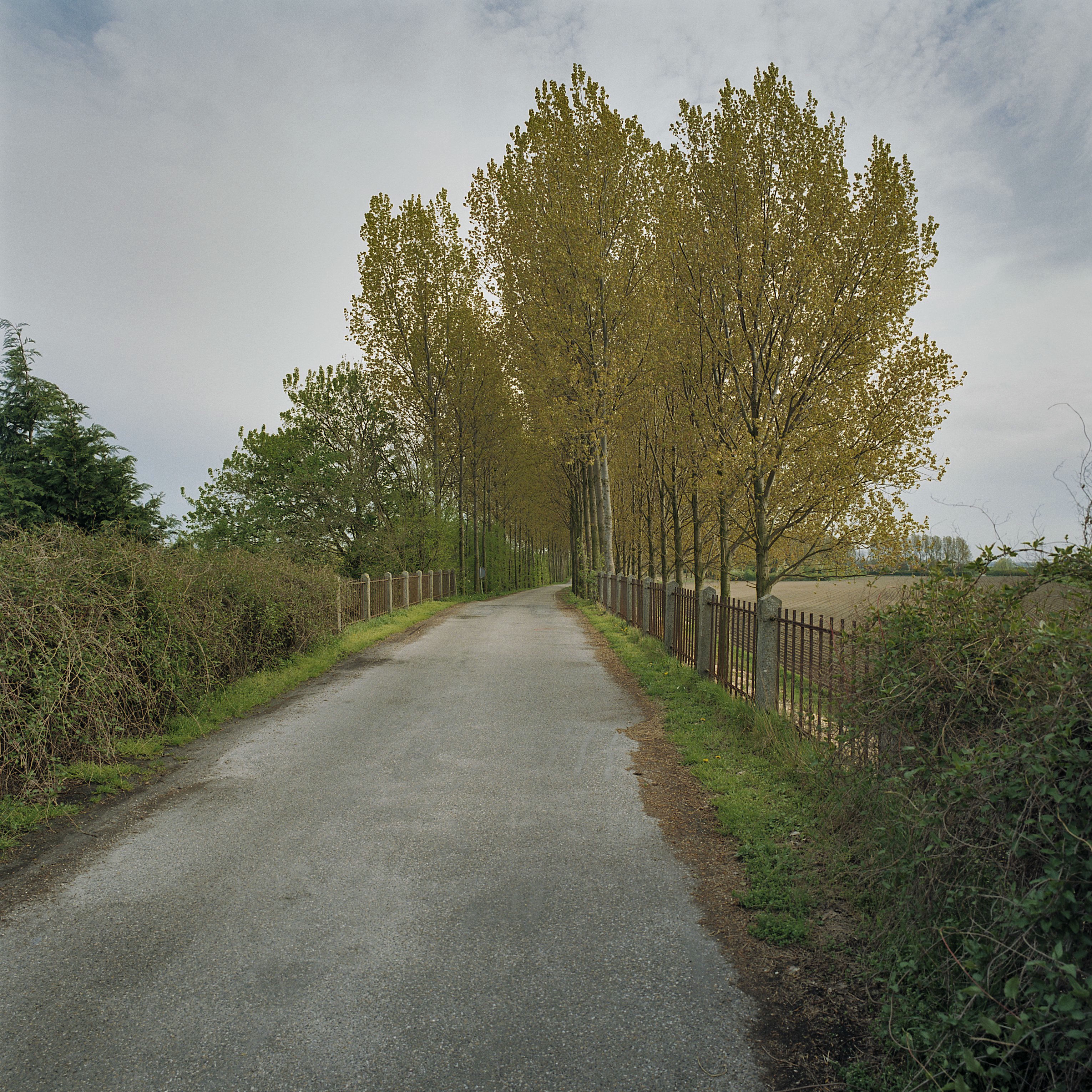 Spoorweg/ Viaduct: Betonnen spoorwegviaduct, overzicht wegdek met hekwerk